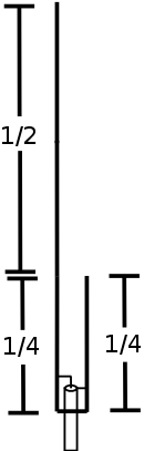 Antenna j-pole diagram